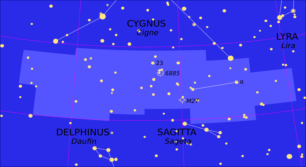 Representacion de la constellacion dau Pichon Rainard